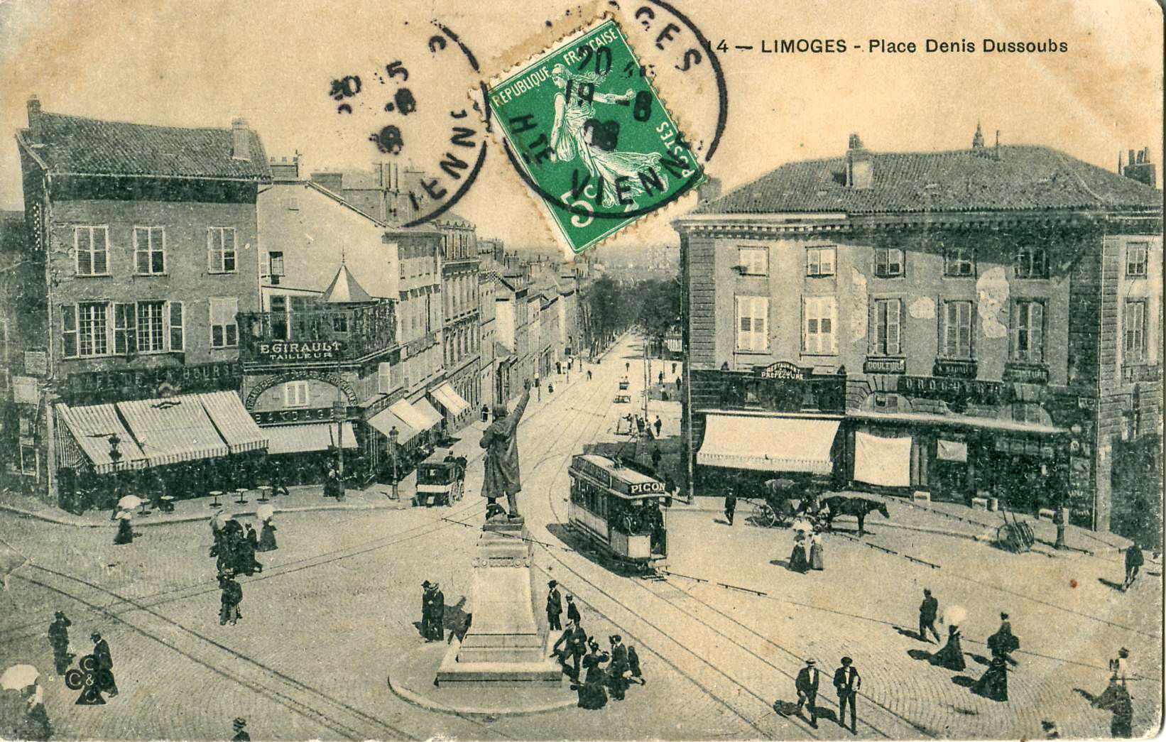 Carte postale ancienne sans mention d'éditeur, n°14 : LIMOGES - Place Denis Dussoubs